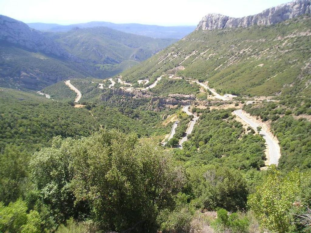 vue de la montée vers le col de l' Espigoulier, depuis Gémenos